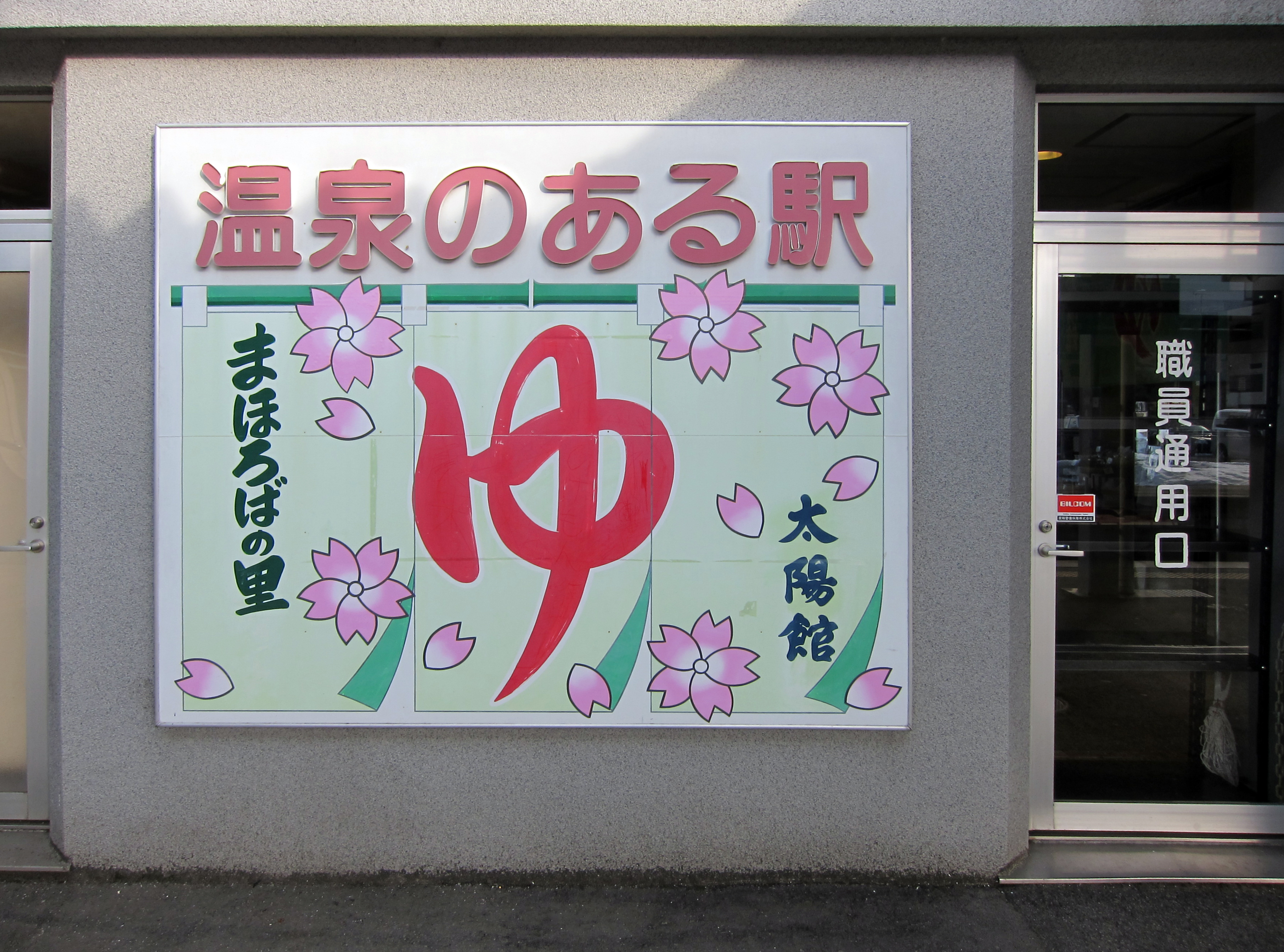 高畠町・太陽館。高畠駅に併設されている温泉施設。